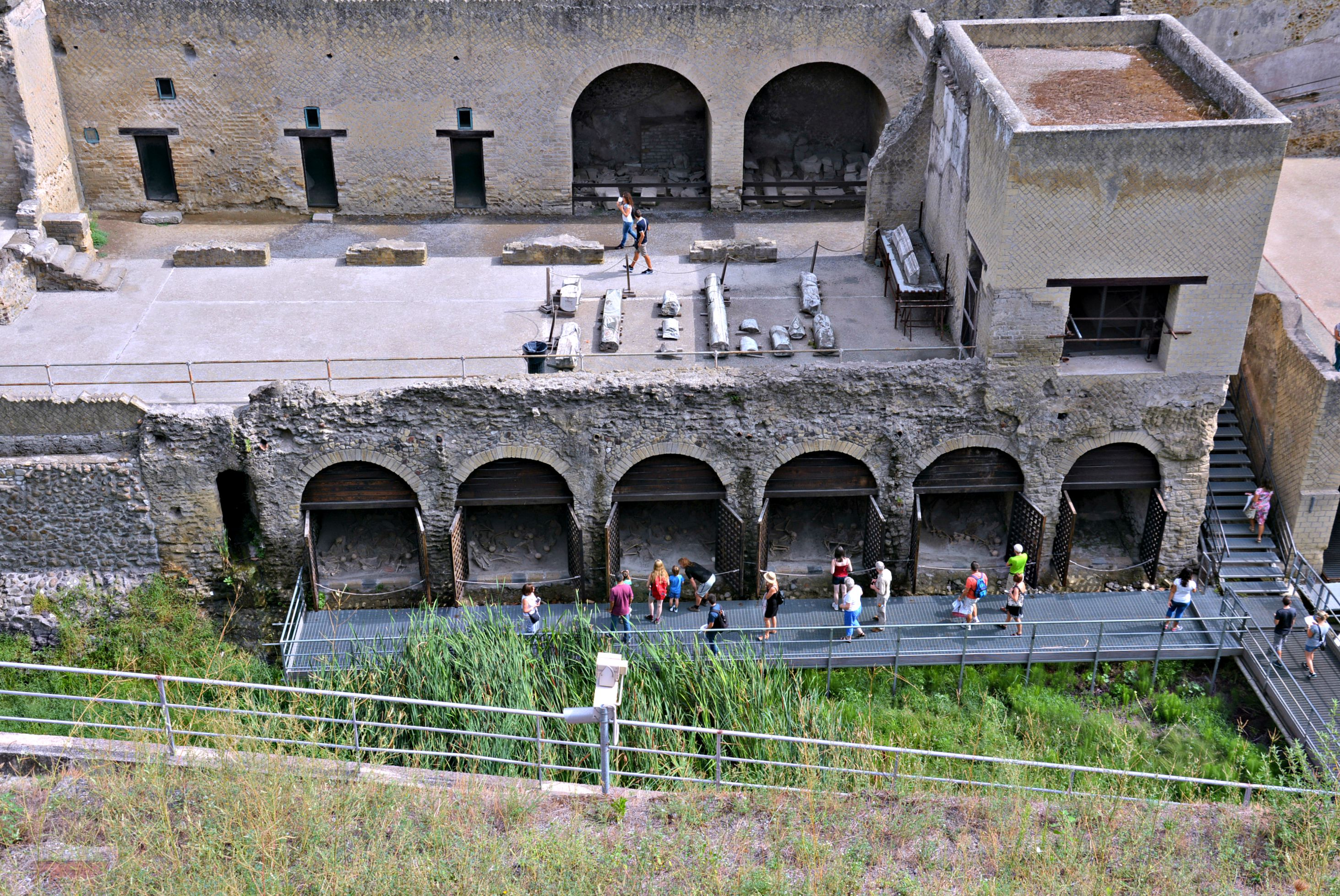 I Fornici sull’Antica spiaggia con i calchi degli scheletri dei fuggiaschi musealizzati in sito - MIBAC This is a photo of a monument which is part of cultural heritage of Italy.